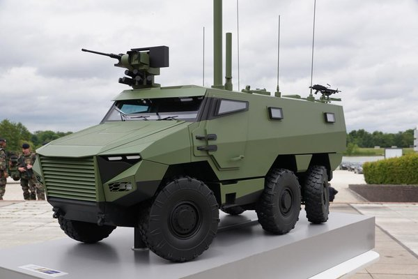 Griffon, nouveau blindé de l'armée française. Exposition 2016.